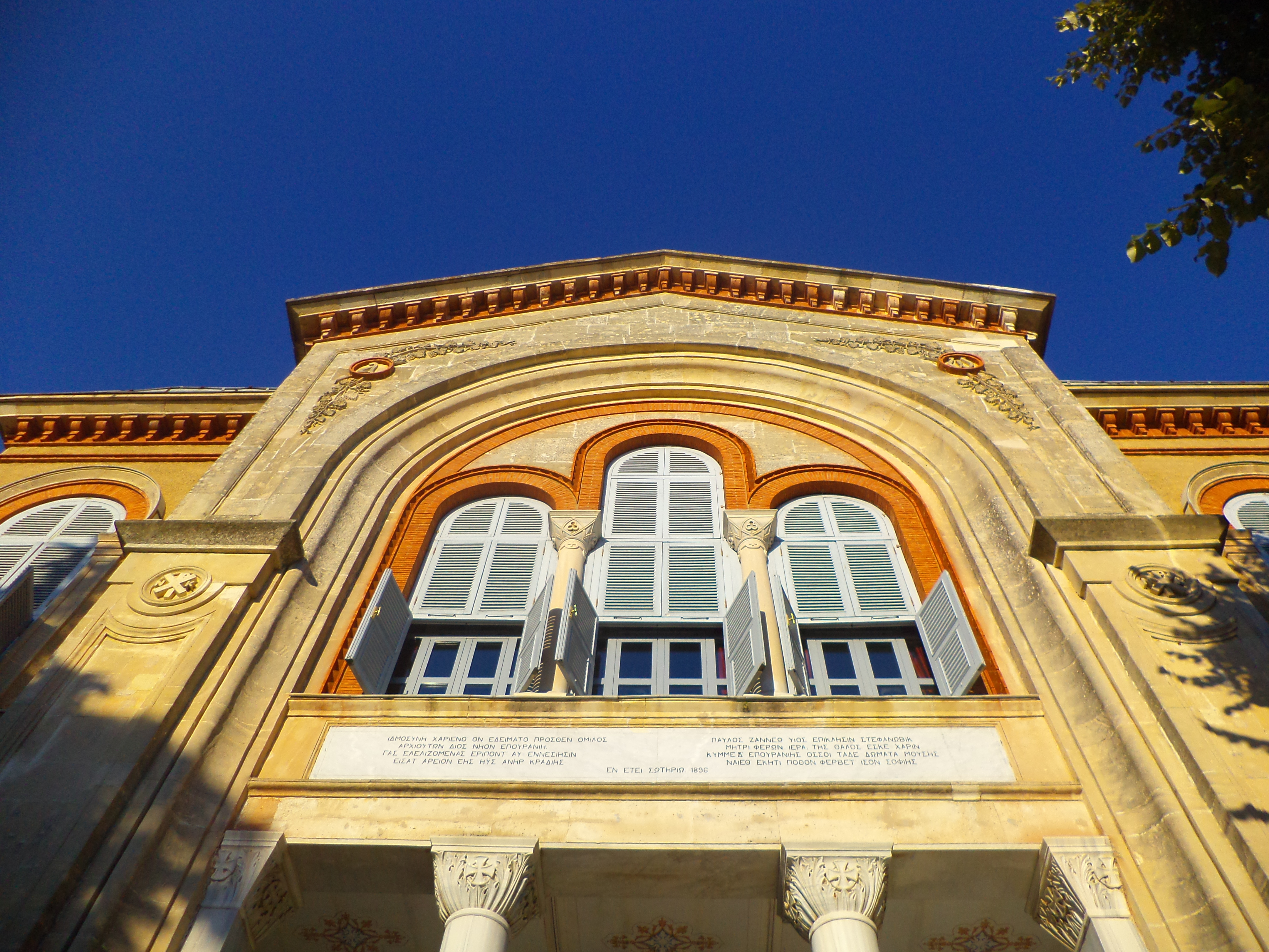 Η Ἱερὰ Θεολογικὴ Σχολὴ τῆς Χάλκης- Πρόσοψη του κτηρίου